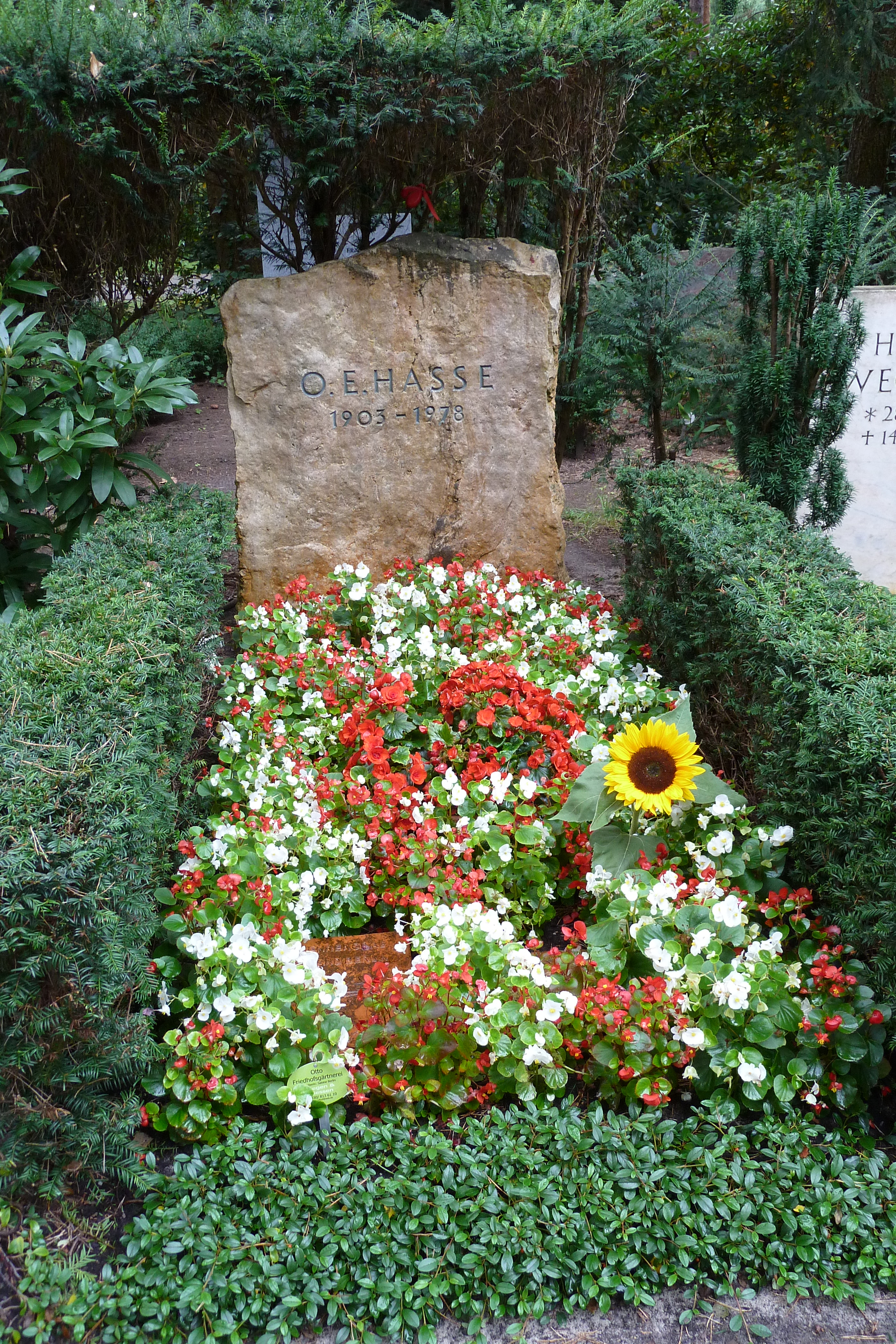 Waldfriedhof Dahlem, Grab O. E. Hasse